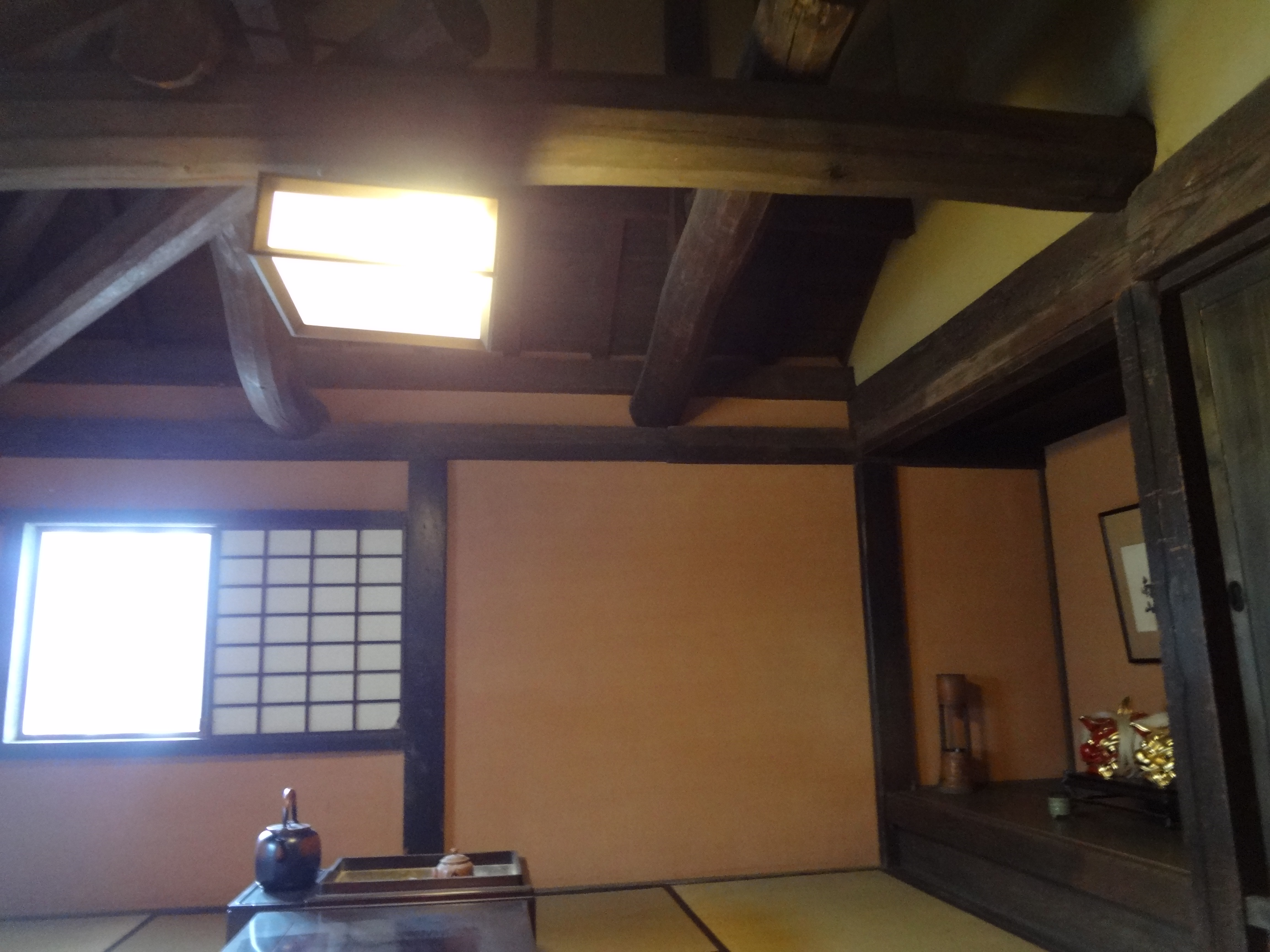 身分制度などの規制を強化した元和元年（1615年）の武家諸法度発布から、規制が緩和される元禄時代までに2階床の間が有ったことが武家の証し。